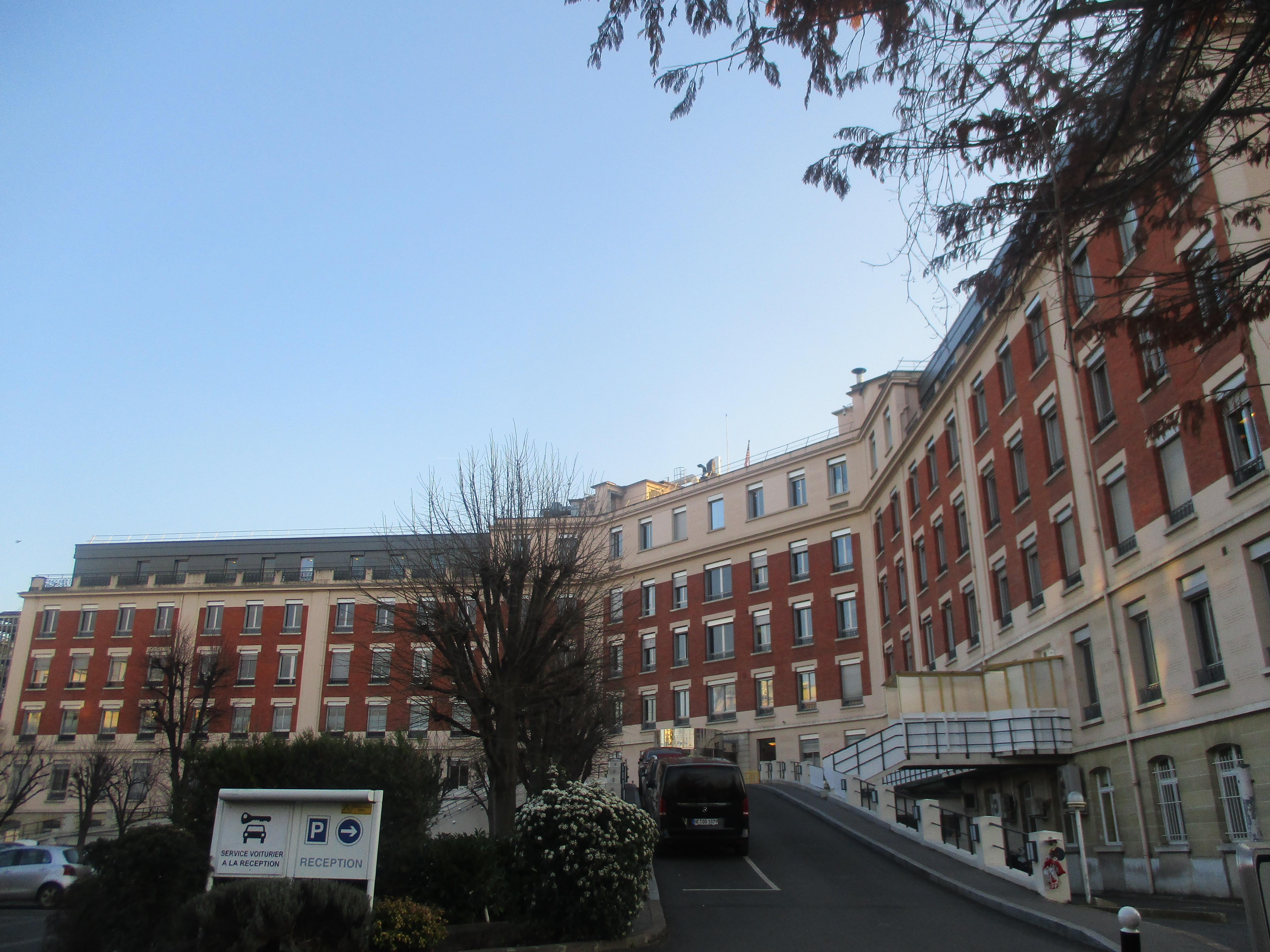 Entrée de l'hôpital américain, boulevard de La Saussaye à Neuilly.